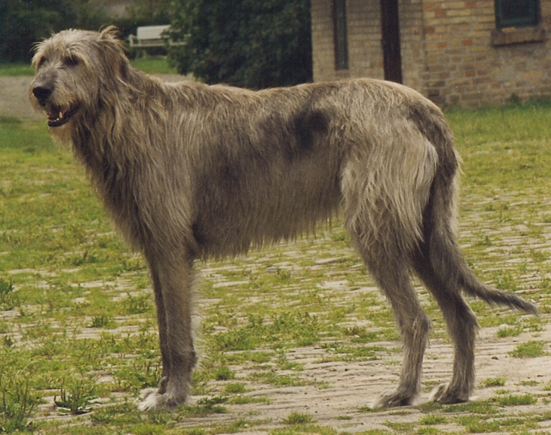 Irischer Wolfshund-Rüde „Sam“, 8 Jahre alt